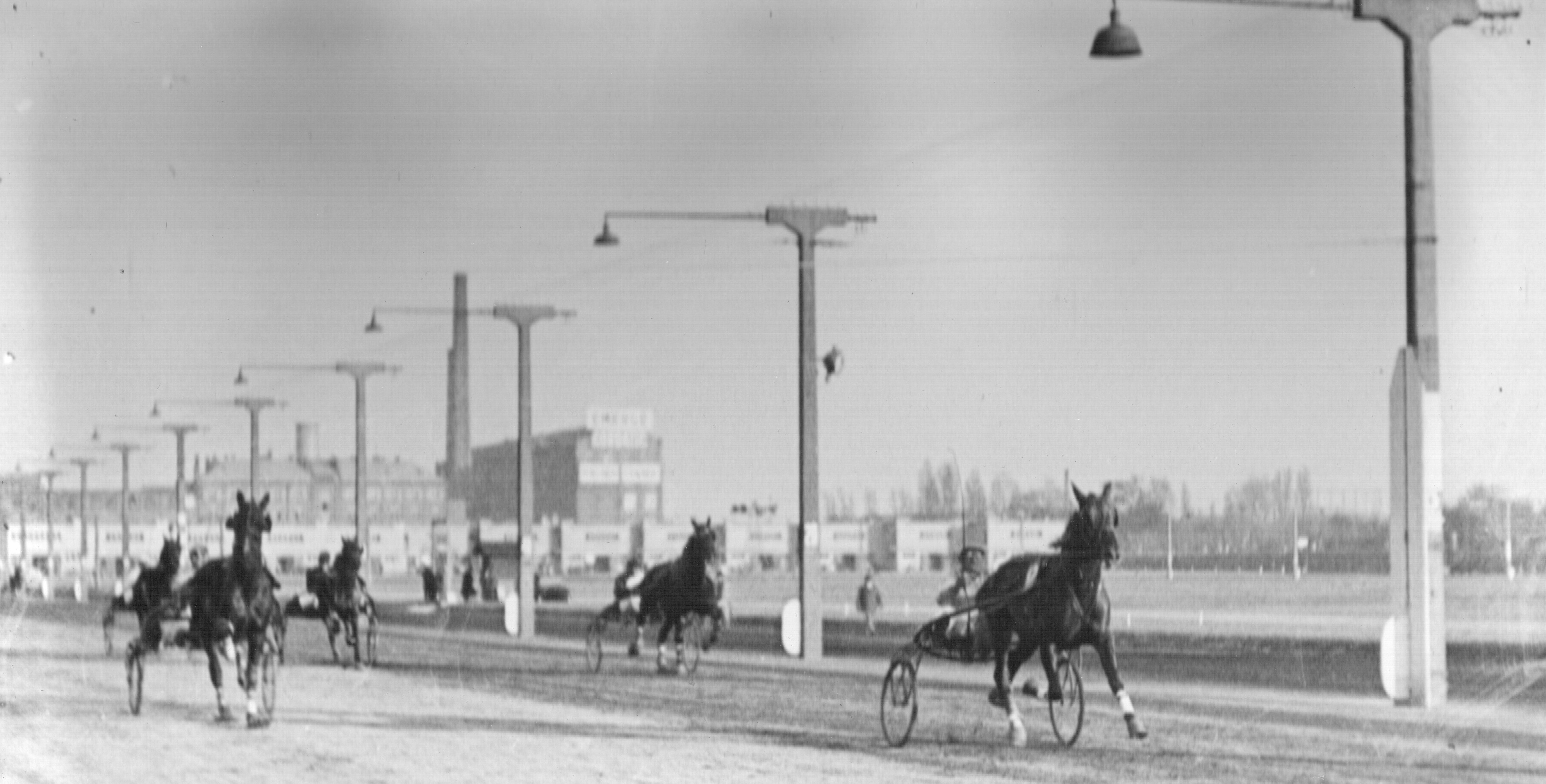 Az ismeretlen szerző felvétele 1939. október 21-én készült Budapesten, a Lóversenypályán. Levandula díj győztese. Az utolsó békeév. Megjelent a hátoldalán levő bélyegzéssel együtt a Metapolisz DVD sorozatban.